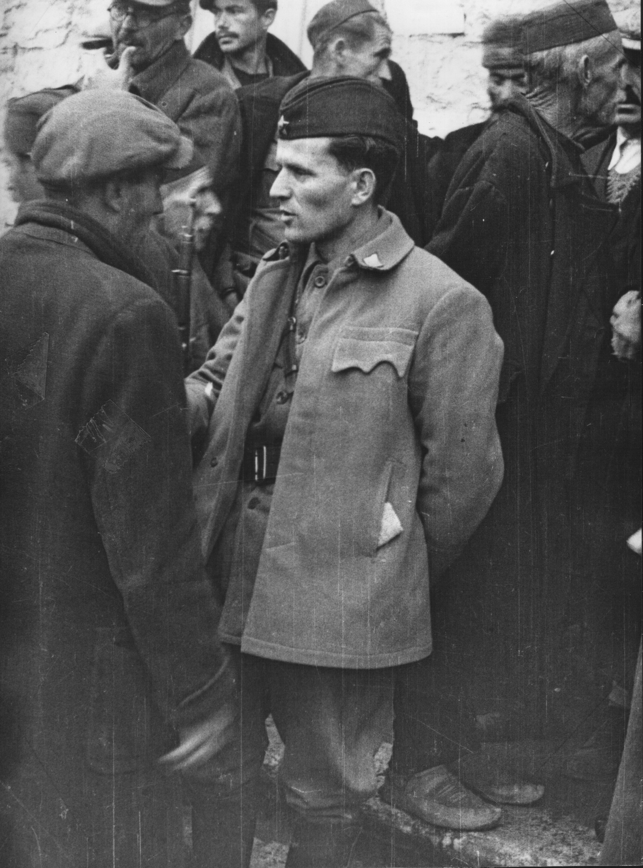 Srpskohrvatski / српскохрватски: Peko Dapčević razgovara sa delegatima na prvom zasedanju Zemaljskog antifašističkog veća narodnog oslobođenja Crne Gore i Boke, u Kolašinu 1943. godine.